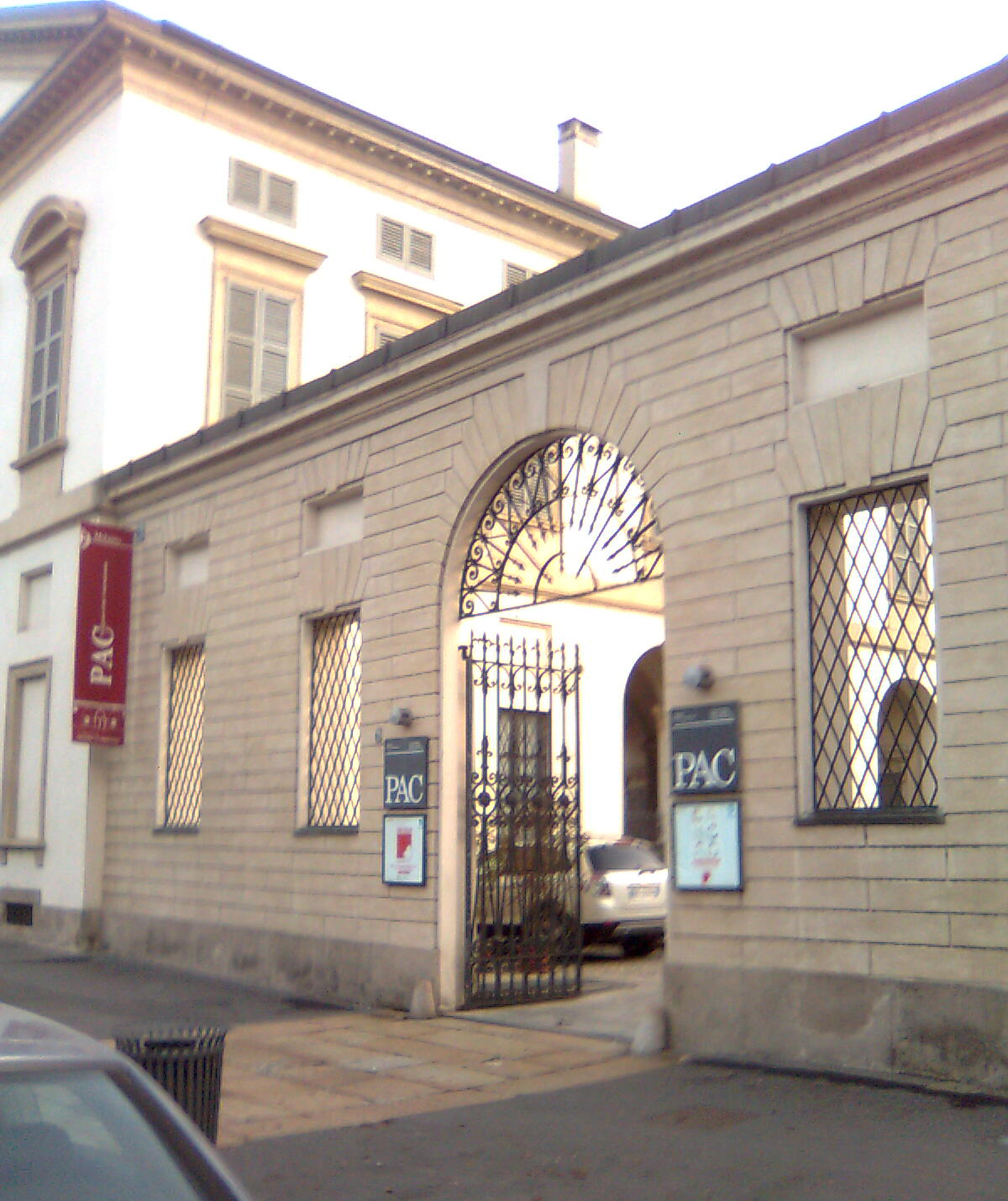 ingresso al cortile esterno del PAC a Milano